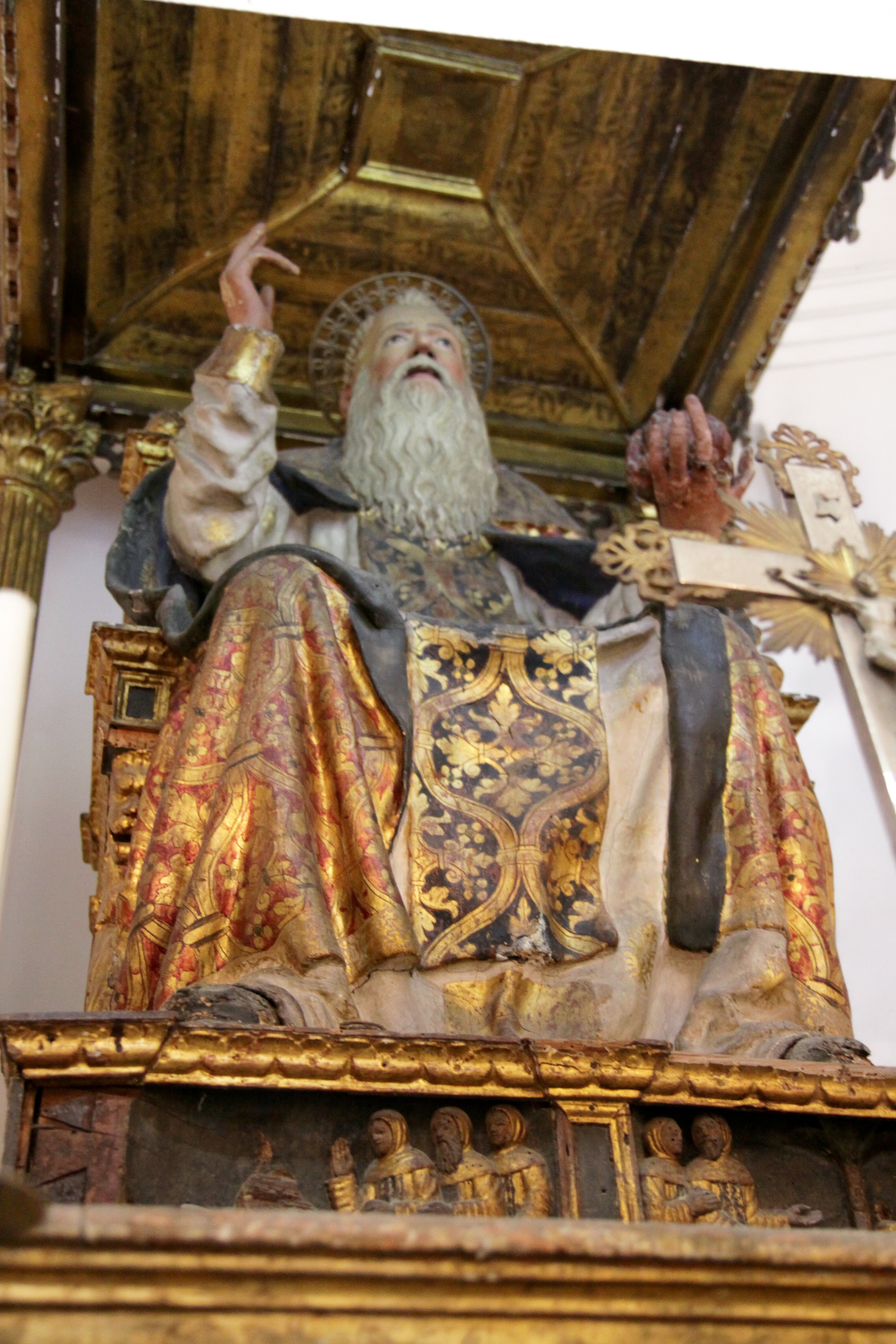 Statua di S. Antonio Abate in cattedra di Antonio De Mauro da Bivona. Anno 1575. Già presso la chiesa di S. Antonio Abate di Militello, non più esistente.